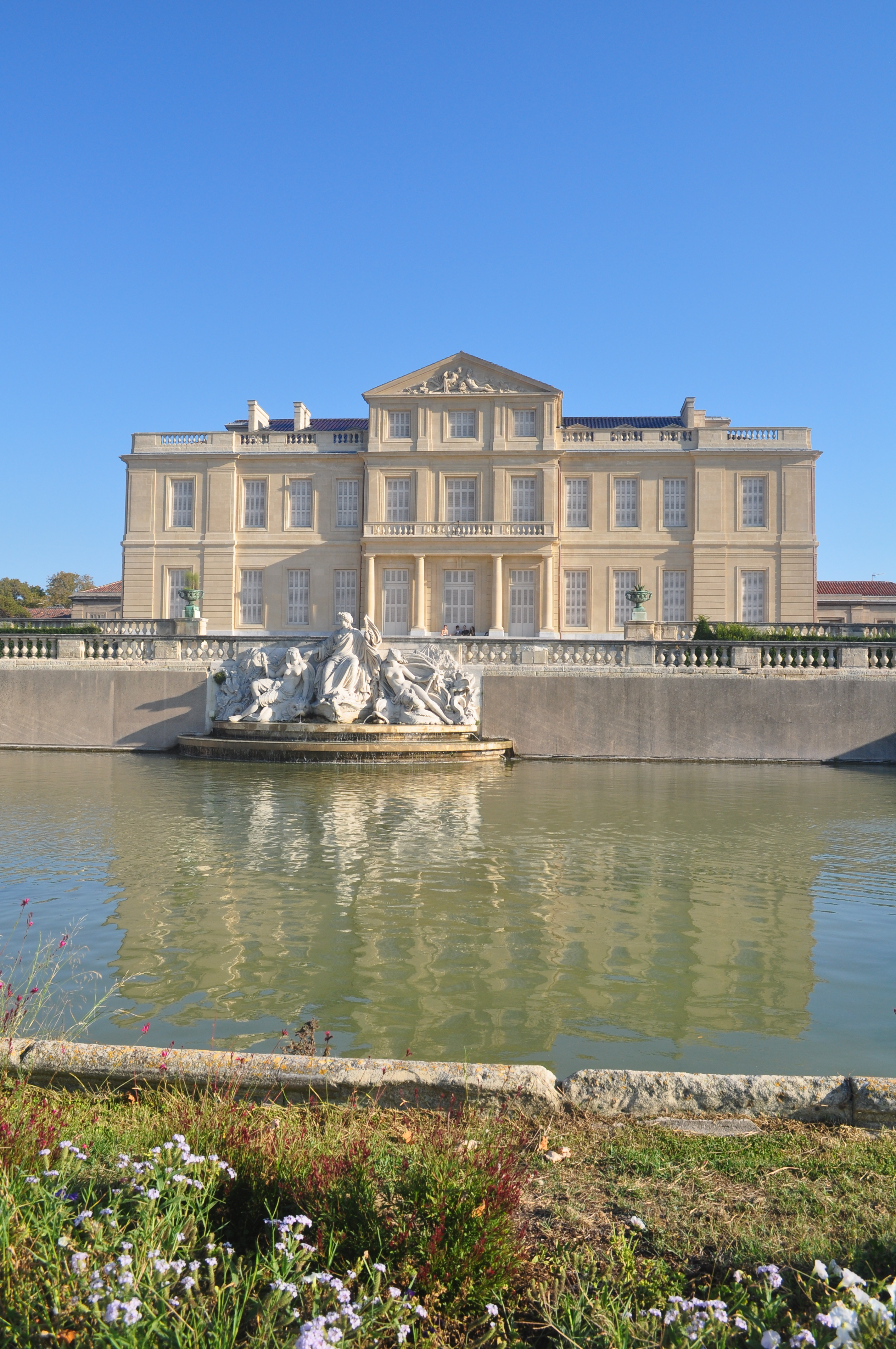 Marseille — Château Borély (10)